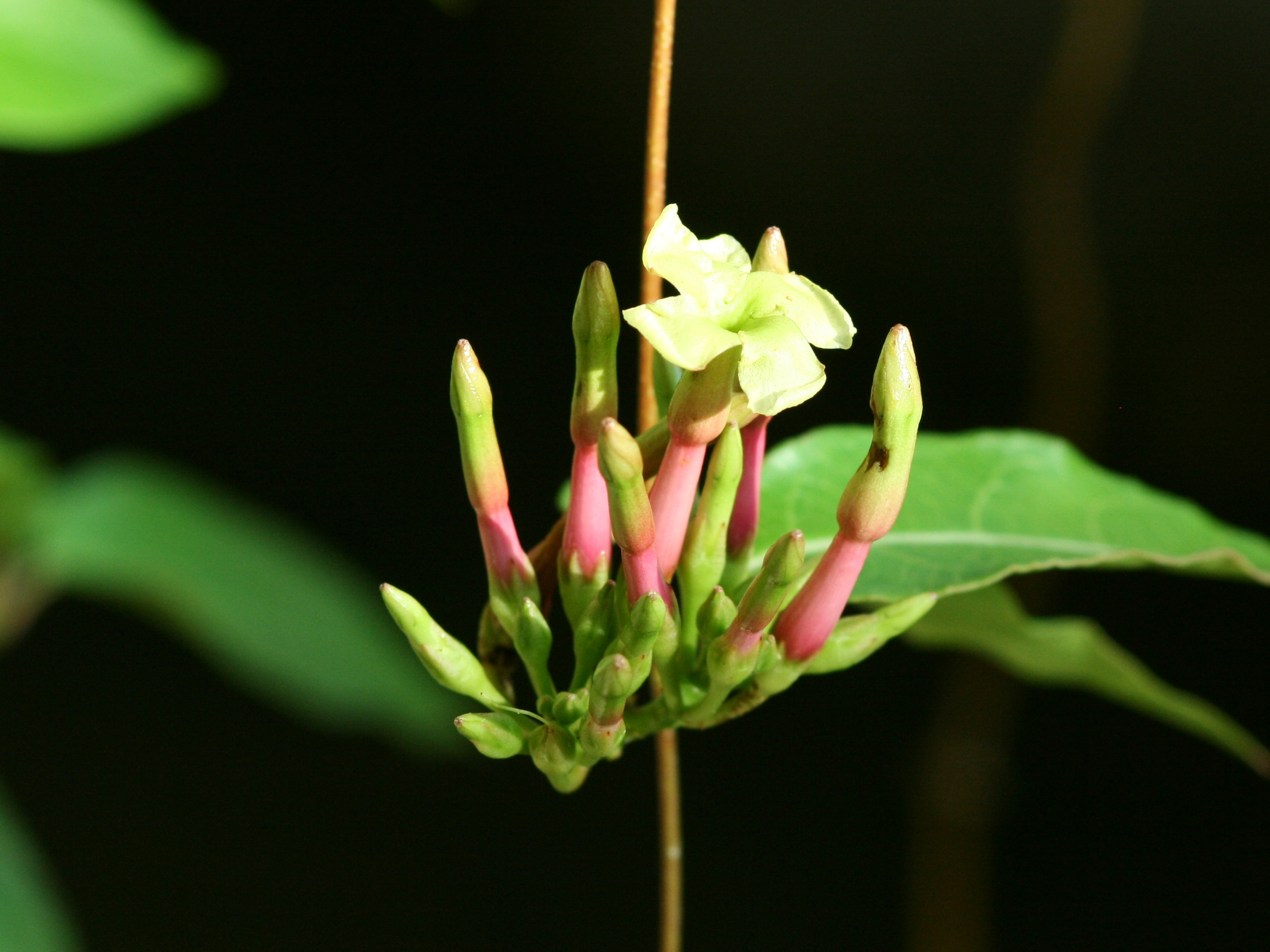 Česky: Kvetoucí tenká liánka Mesechites trifida, Cacuri, Venezuela